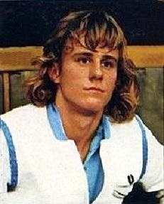 Bjorn Borg, 'Sport Vedettes' Panini 1974 - 1975 n°202